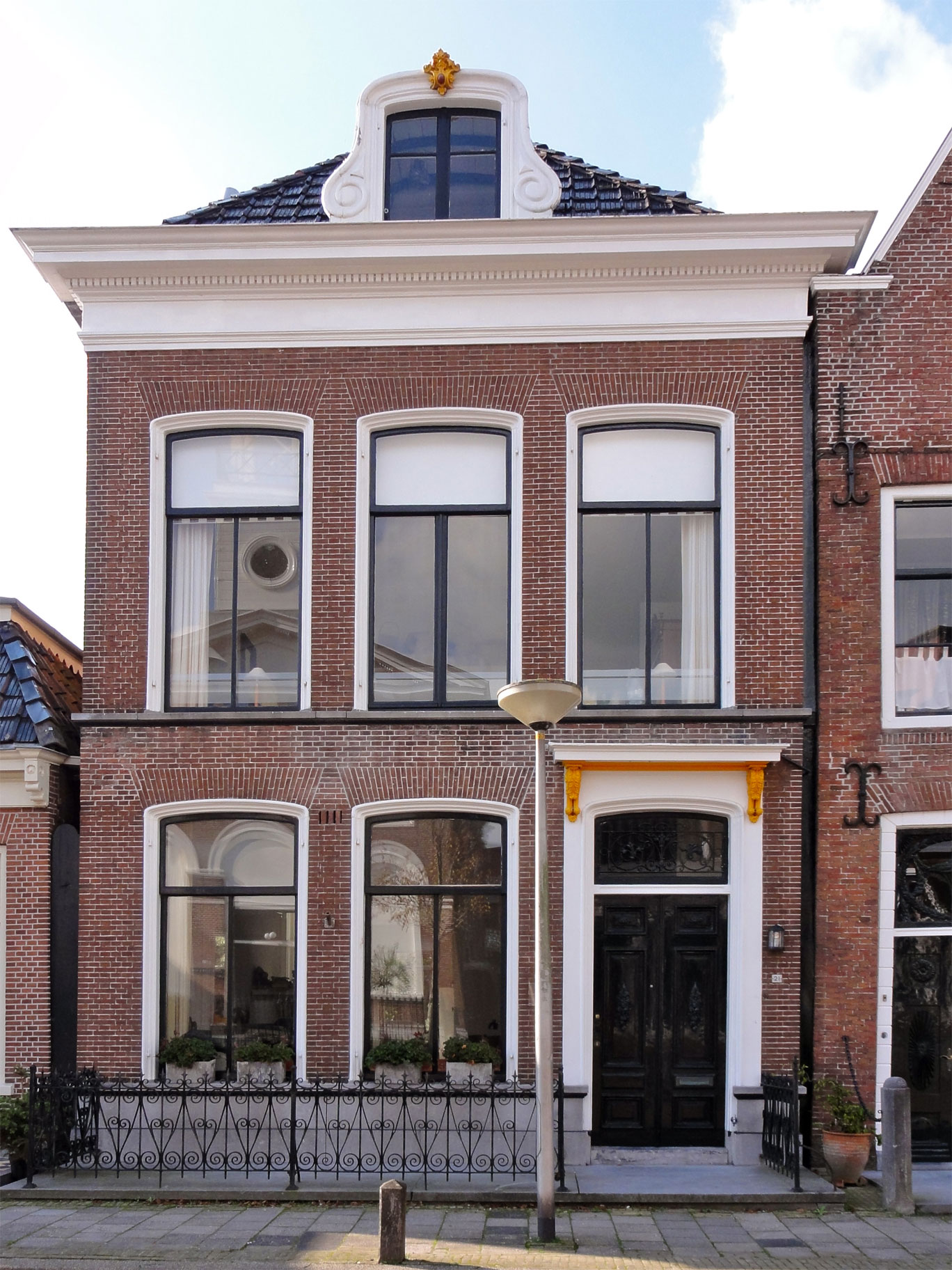 Legeweg 21 Dokkum, rijksmonument